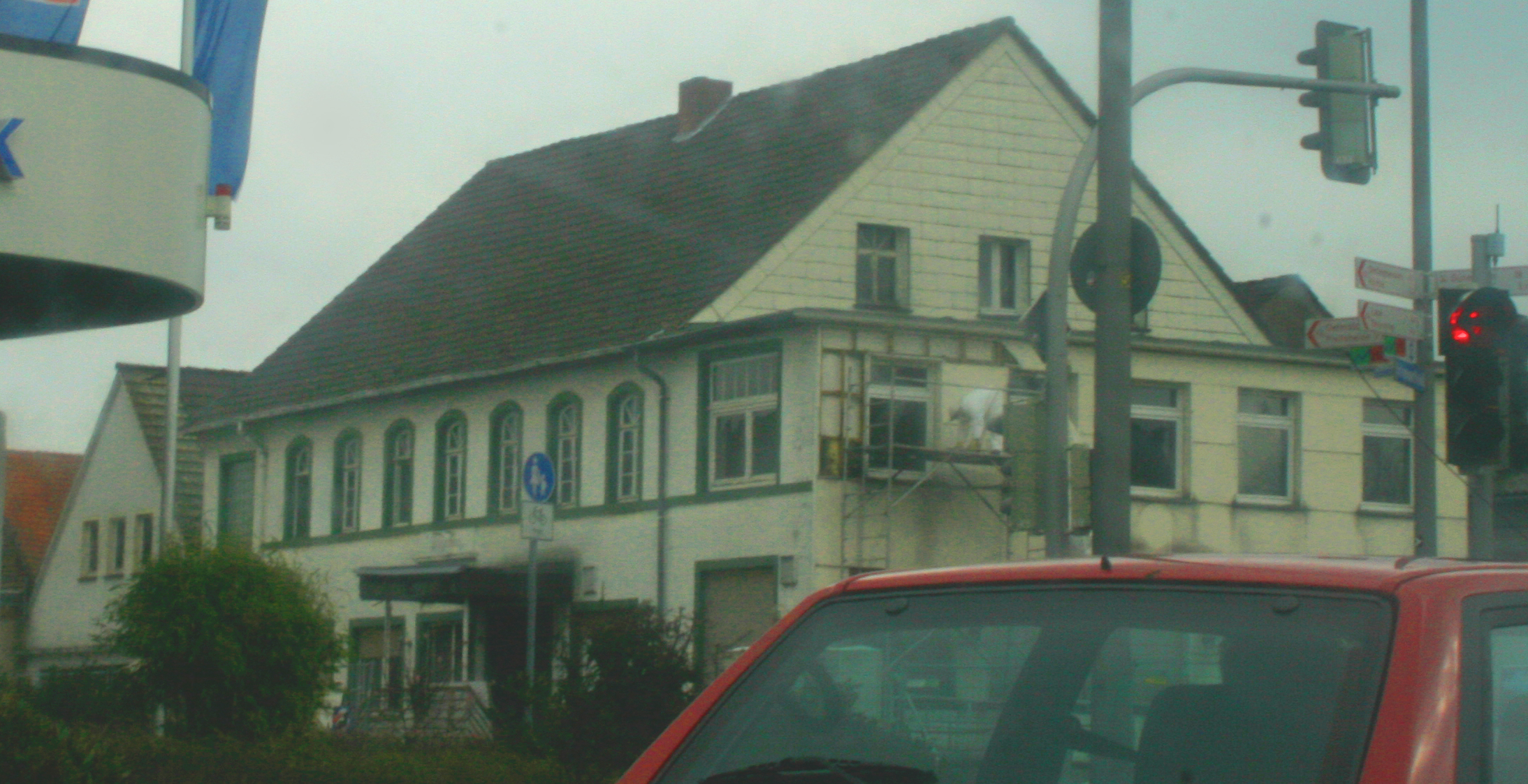 Der historische Eichenkrug in Pivitsheide V.L. kurz vor Beginn der Abbruch-Arbeiten.